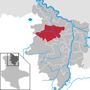 Osterburg (Altmark) im Landkreis Stendal, Sachsen-Anhalt